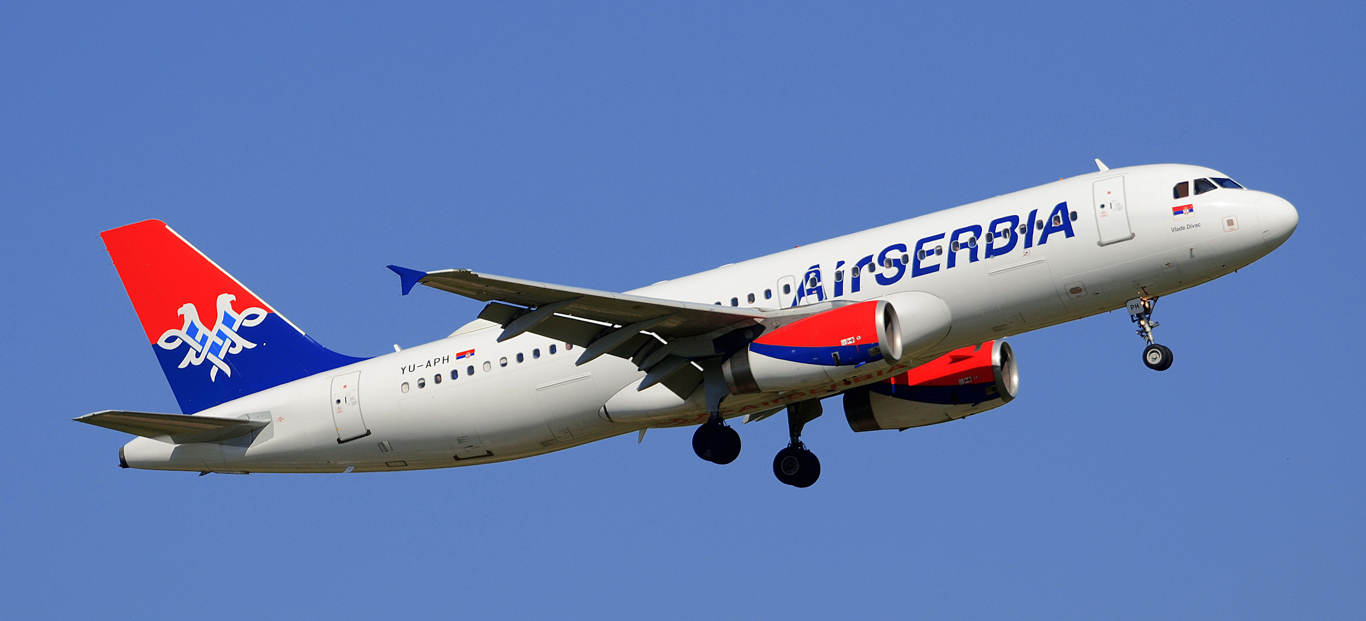 Подробнее здесь